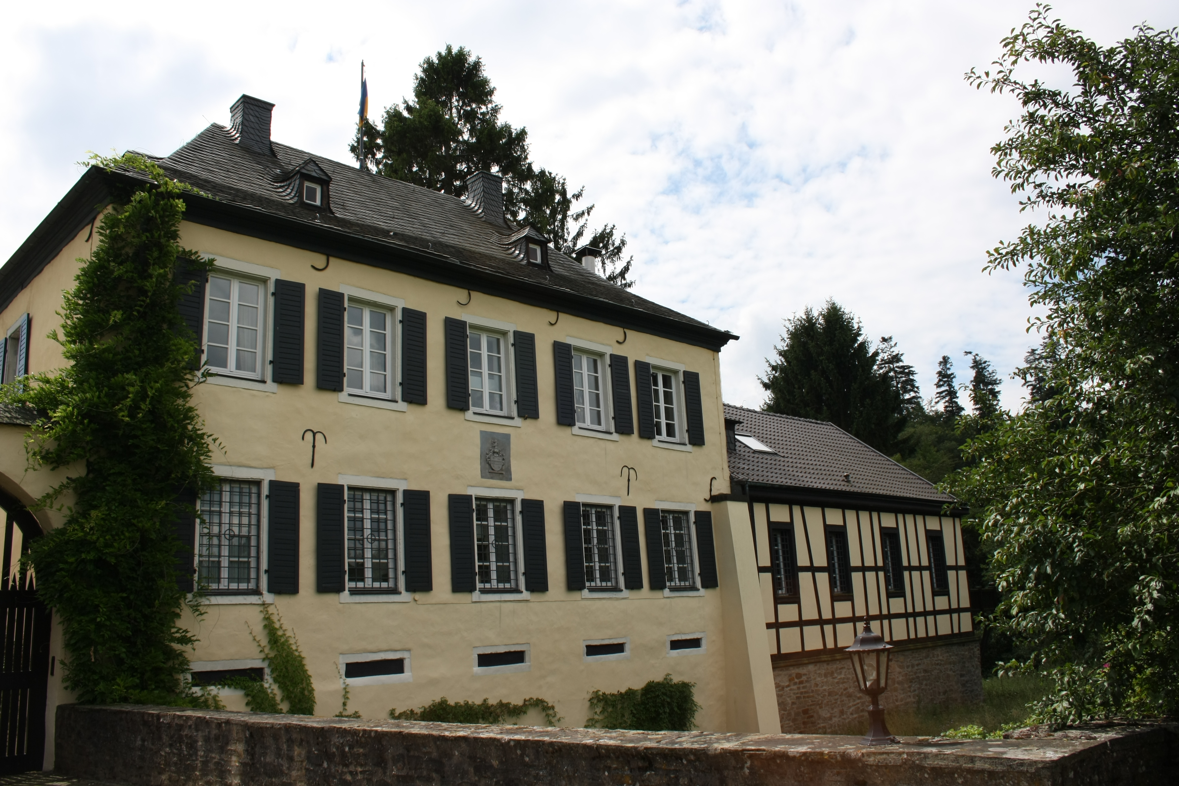 Schloss Vischel (sogenannte Burg) in Vischel, einem Ortsteil von Berg, 1829 erbaut